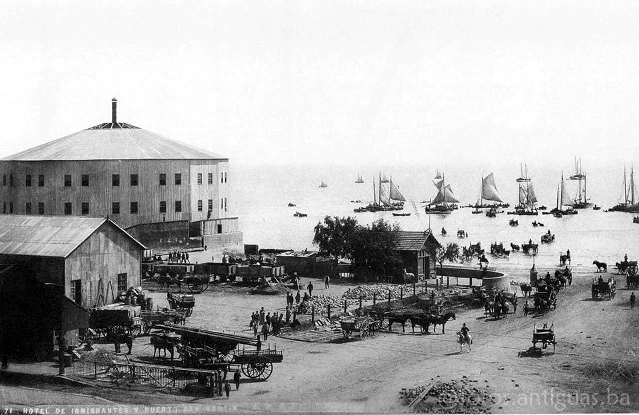 Primer edificio del Hotel de Inmigrantes en Buenos Aires, Retiro, cerca de la actual Terminal de Ómnibus, sobre las orillas del Río de la Plata.